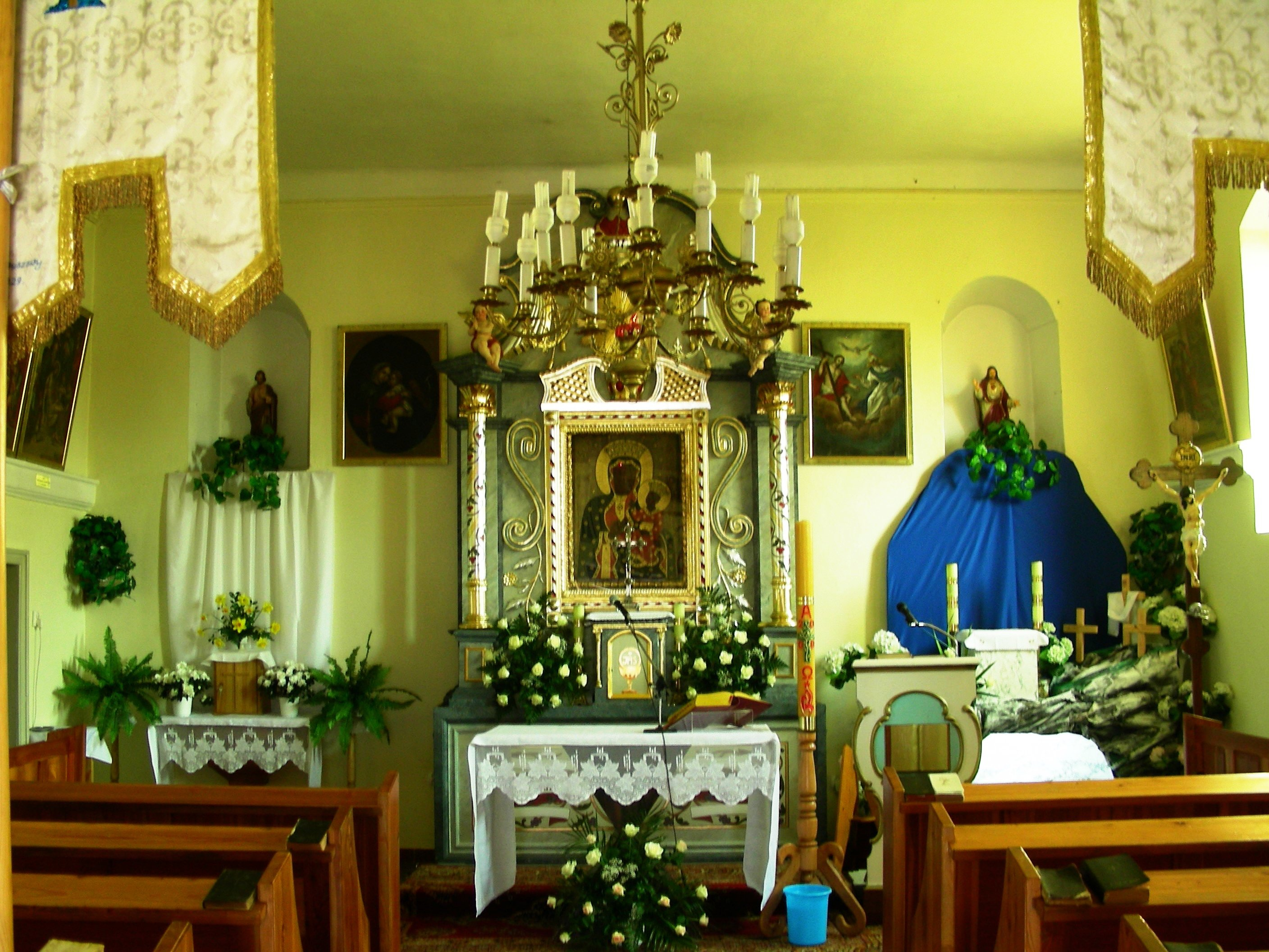 Kościół Matki Bożej Częstochowskiej w Przydrożu Wielkim, Przydroże Wielkie, gmina Korfantów, powiat nyski, województwo opolskie.